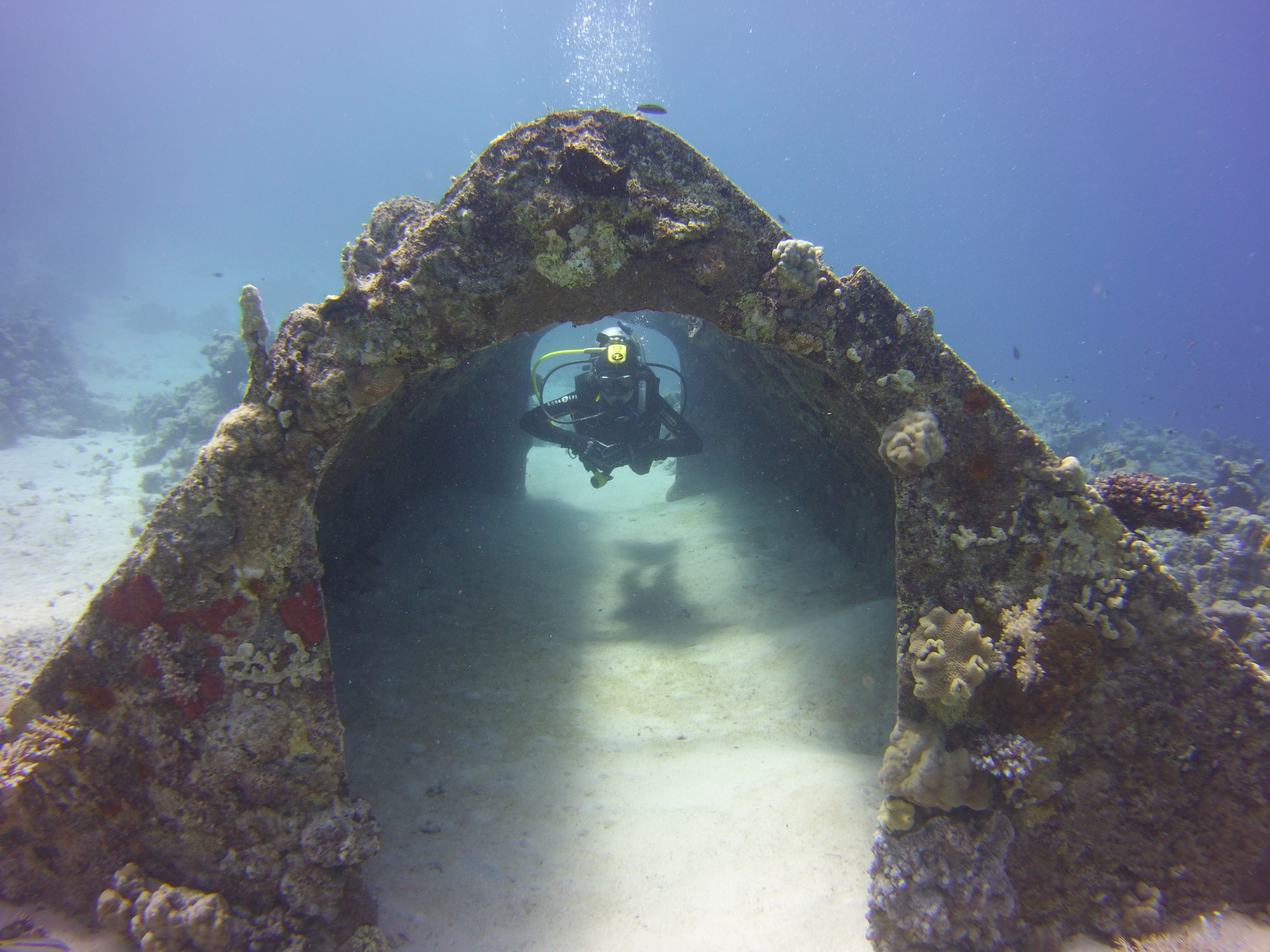 Precontinent II - Tauchsafari Sudan mit UMEX Tauchsport 2017